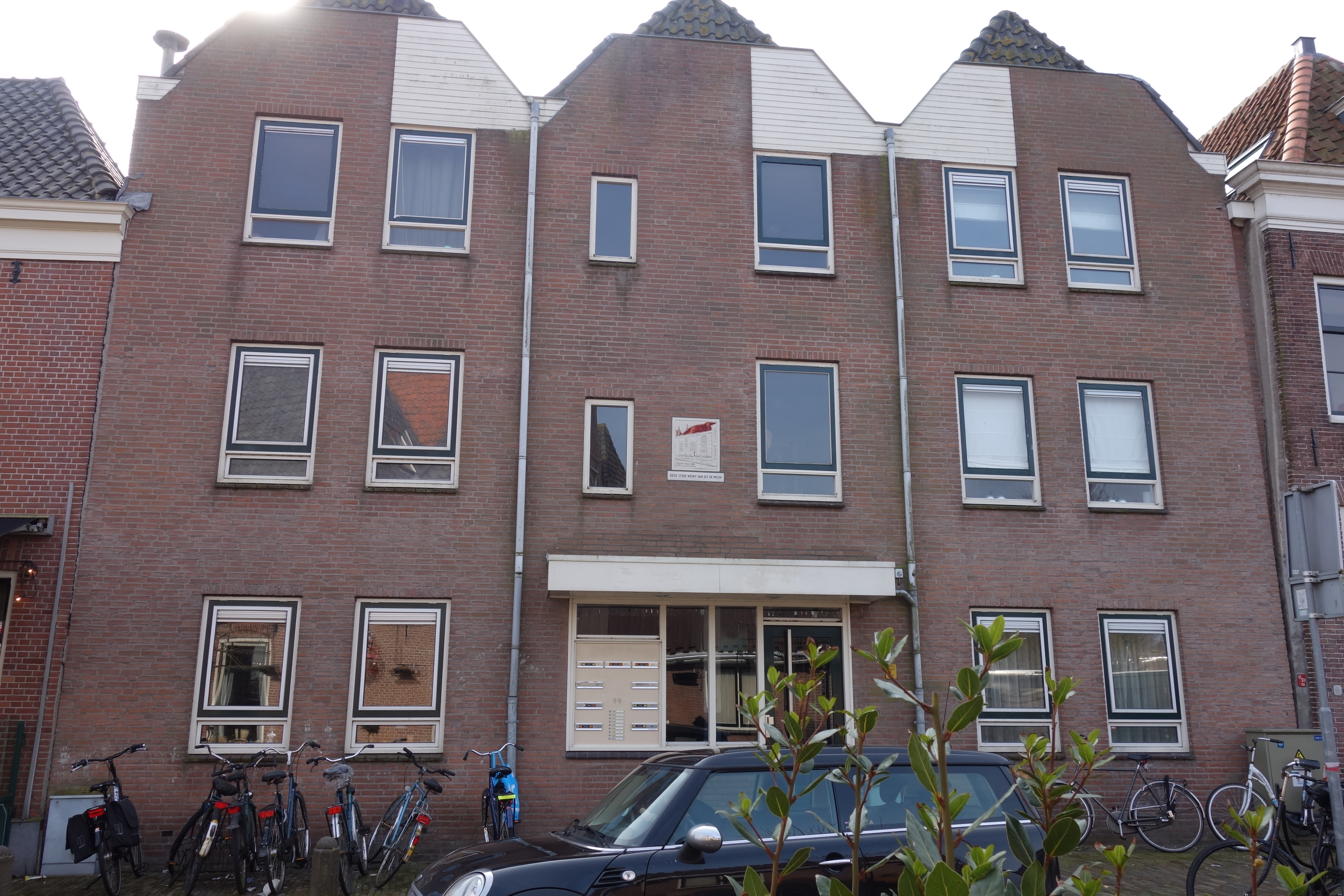 Italiaanse Zeedijk 120 en 122, locatie waar tot 1953 nog de synagoge stond.